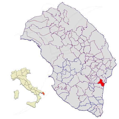 Il territorio del comune di Diso nella provincia di Lecce